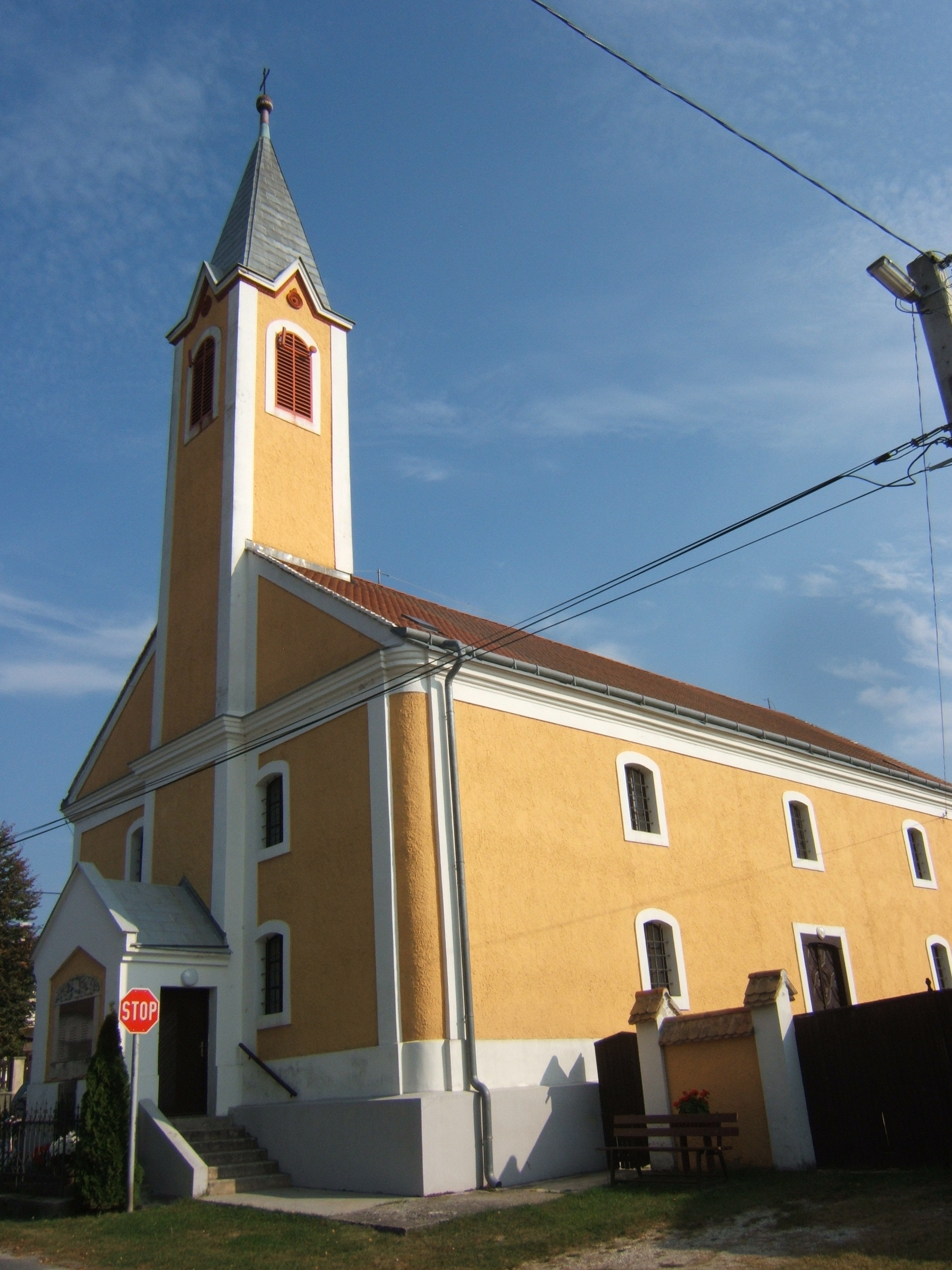 Kajárpéc, kispéci evangélikus templom, klasszicizáló késő barokk, 1789. Részben átalakítva. azonosító: 4481 törzsszám: 3540. - Győr-Moson-Sopron m., Kajárpéc, Kispéc Fő u.